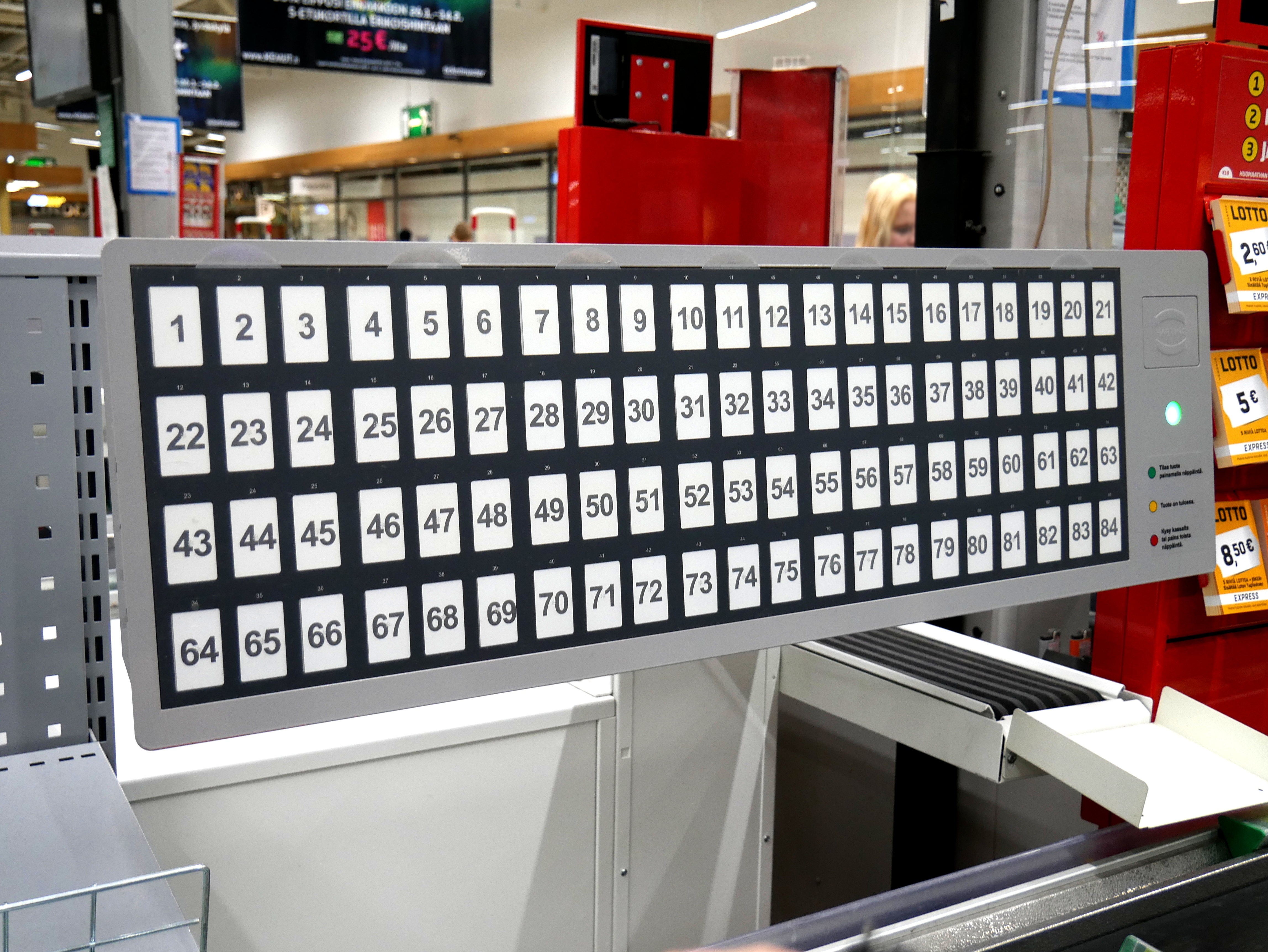 Tupakka-automaatti ruokakaupan kassalla.